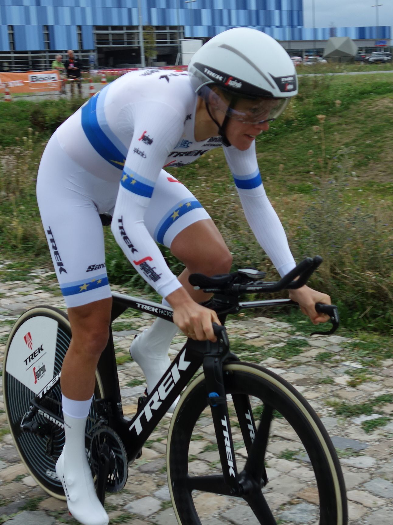 Ellen van Dijk (Trek-Segafredo) bij de proloog op het Tom Dumoulin Bike Park in Sittard in de Boels Ladies Tour 2019